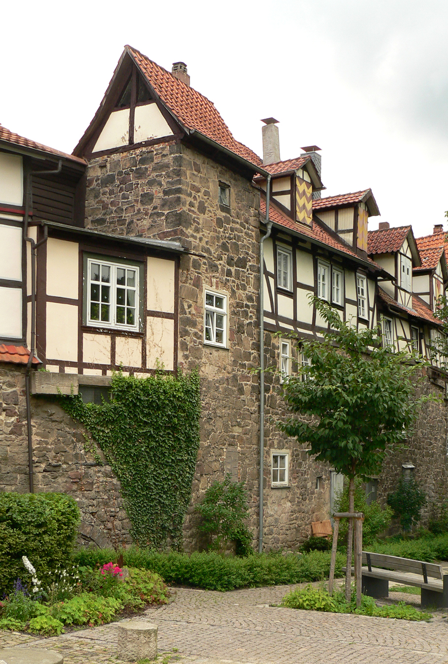 Viereckturm der Stadtbefestigung Münden am Dielengraben